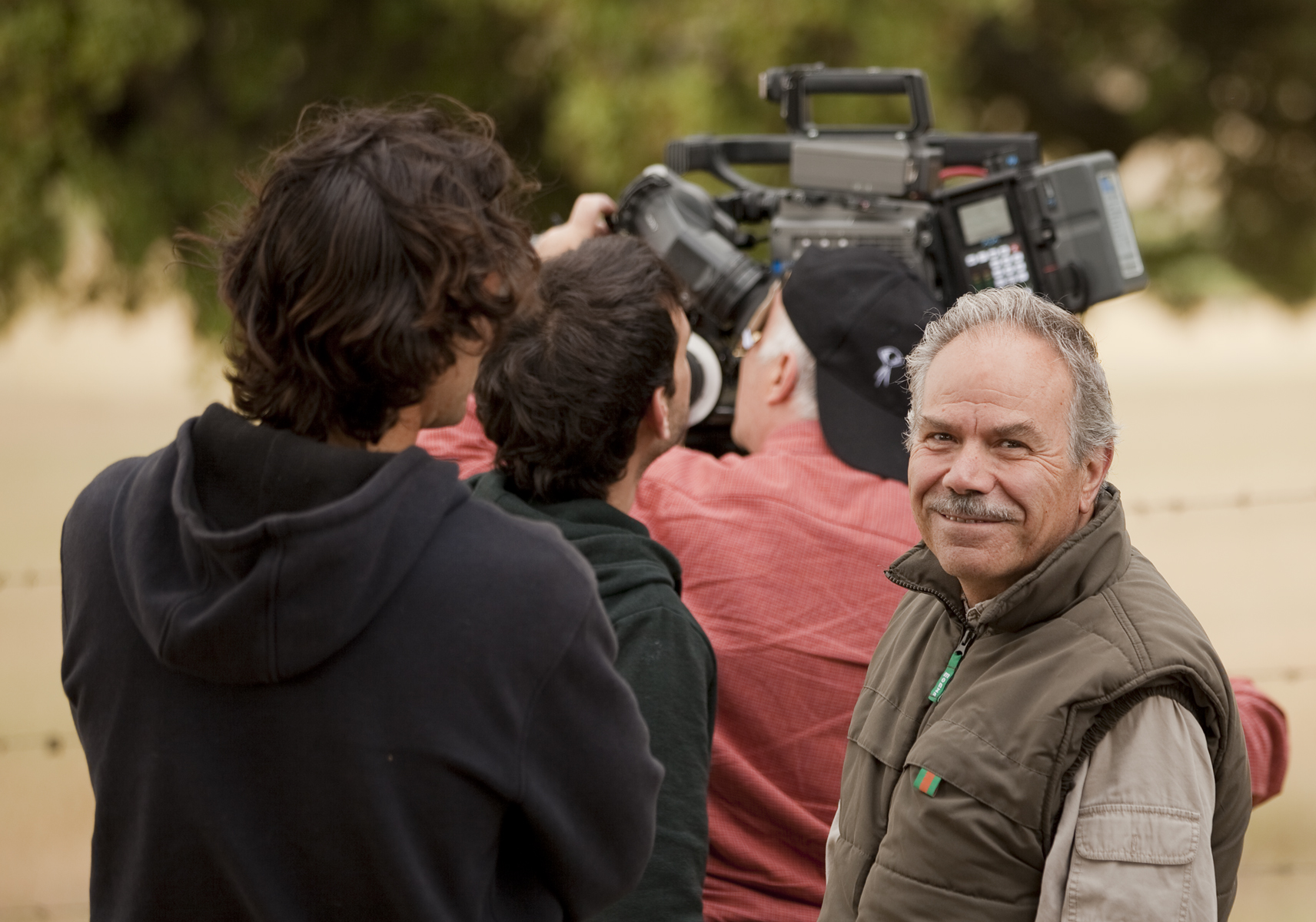 Francisco Rodríguez rodando "Santa Teresa"